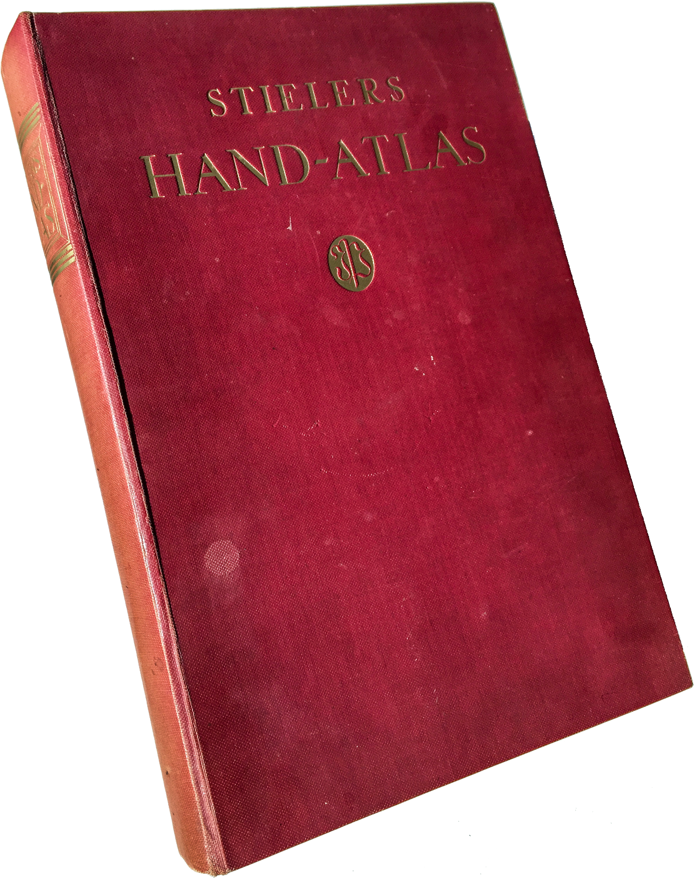 Einband der Hundertjahr-Ausgabe von "Stielers Hand-Atlas"